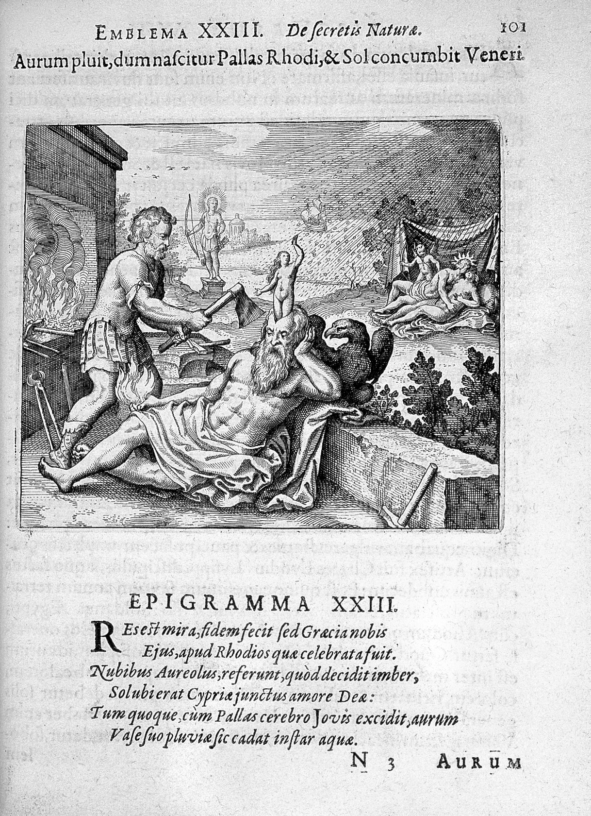 Epigramma XXIII. Rare Books